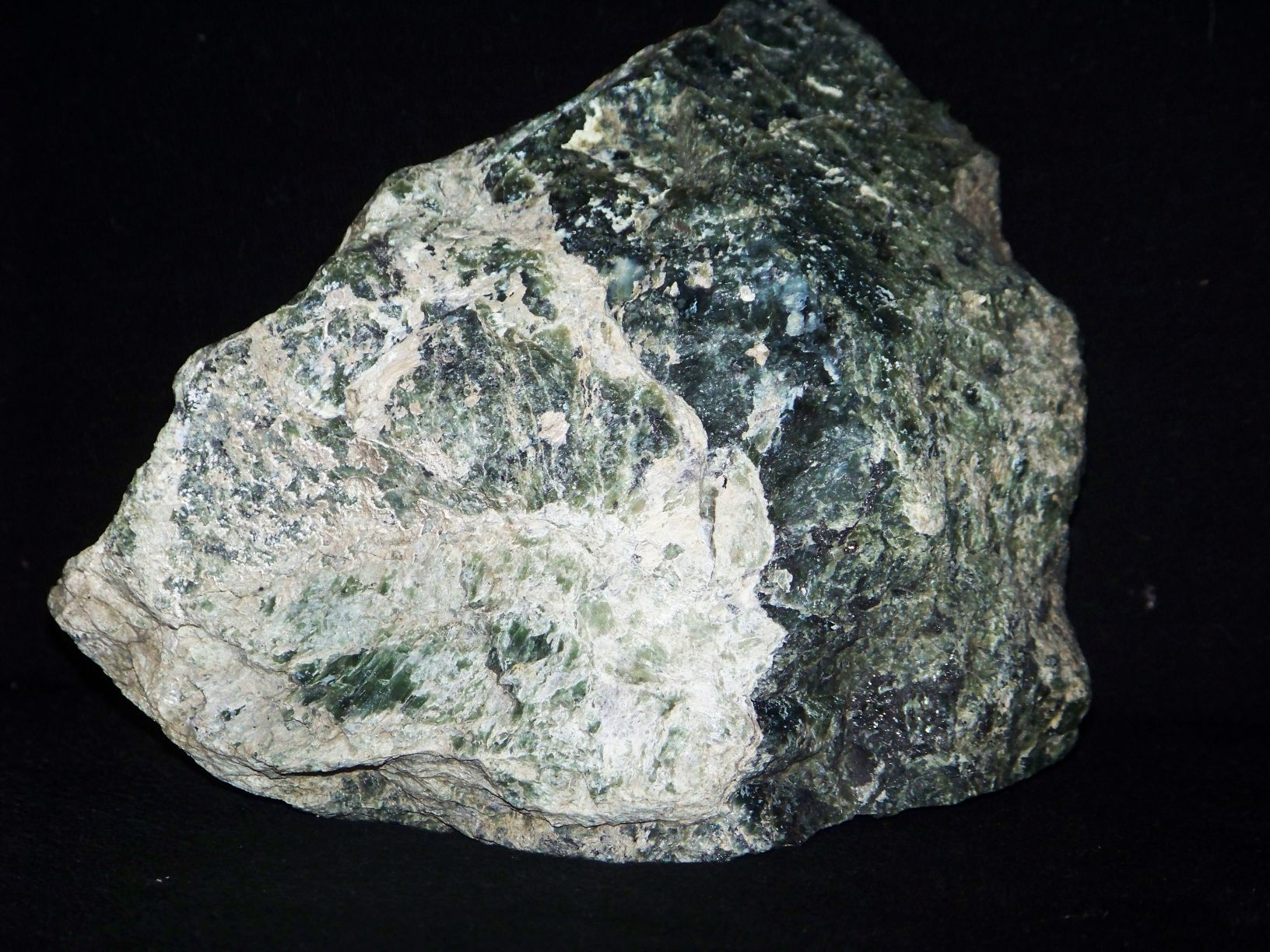 Serpentynit z antygorytem i magnetytem, masyw serpentynitowy Strzegom-Sobótka, Dolny Śląsk